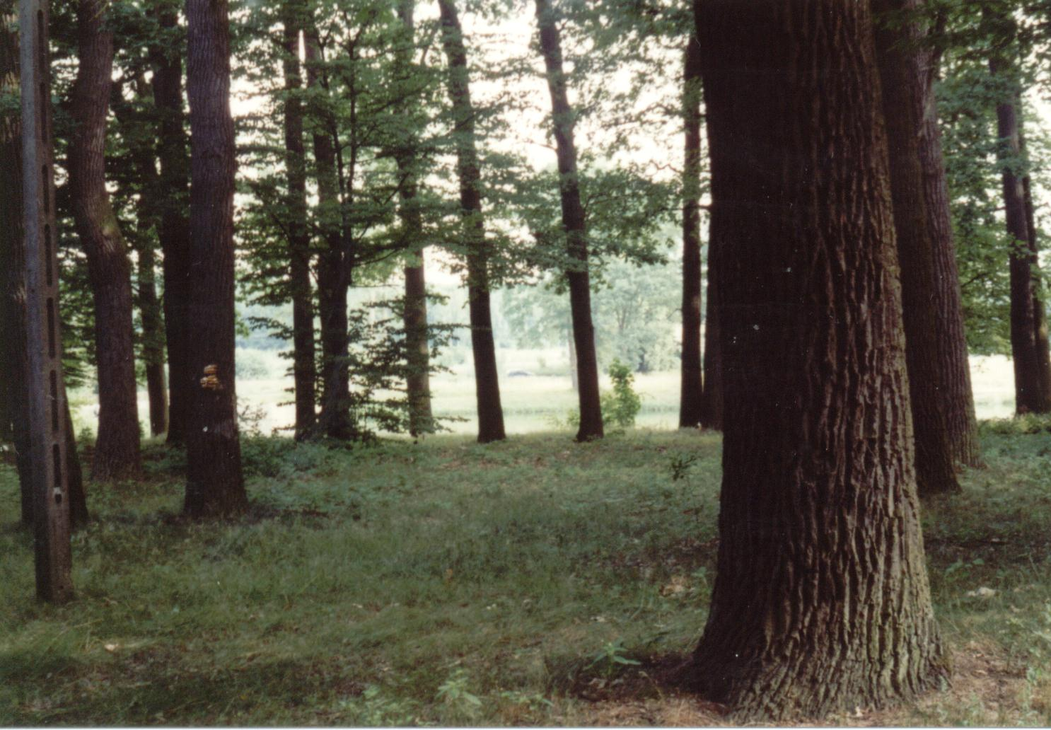 Park dworski w Babsku